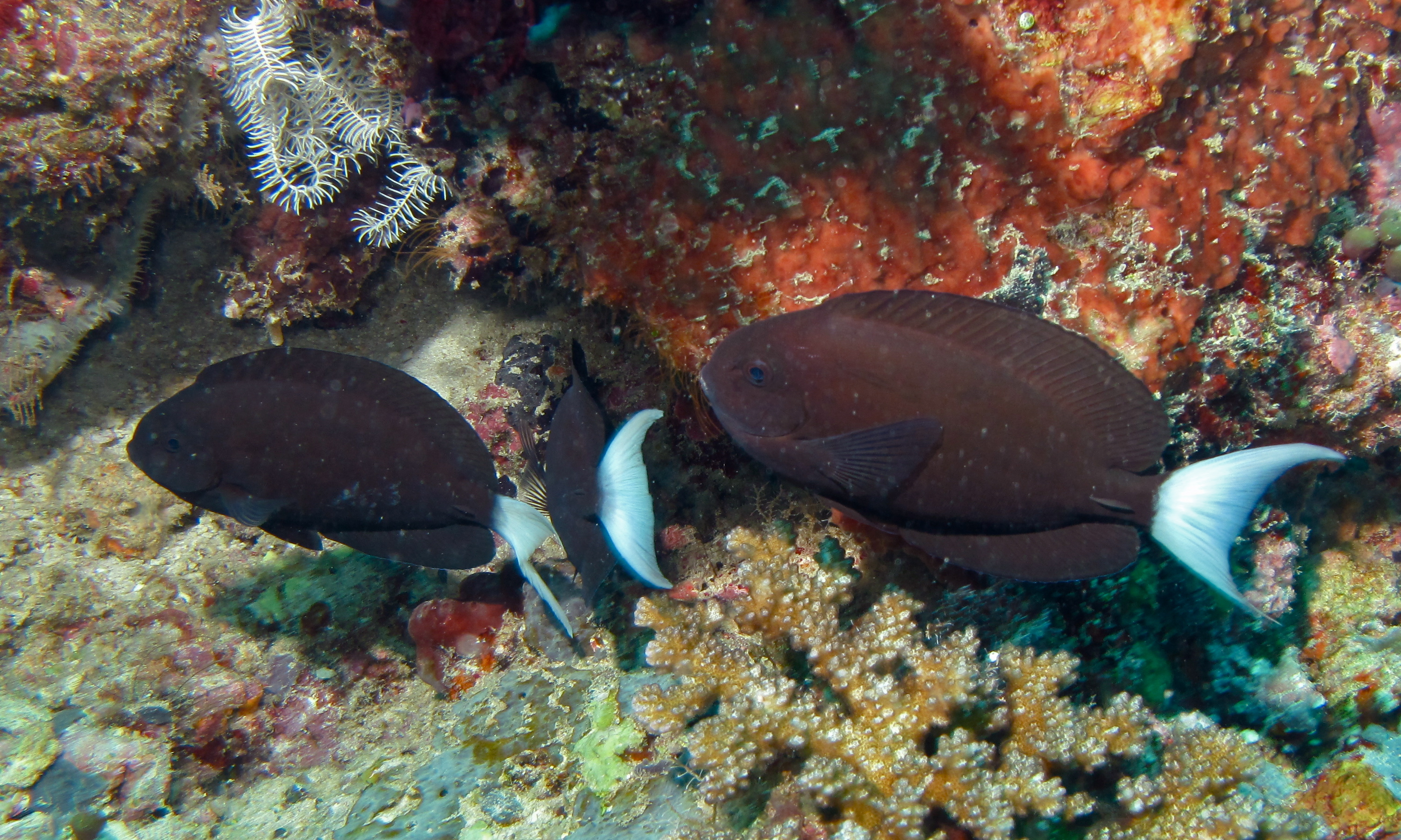 South Point, Sipadan, Sabah, MALAYSIA